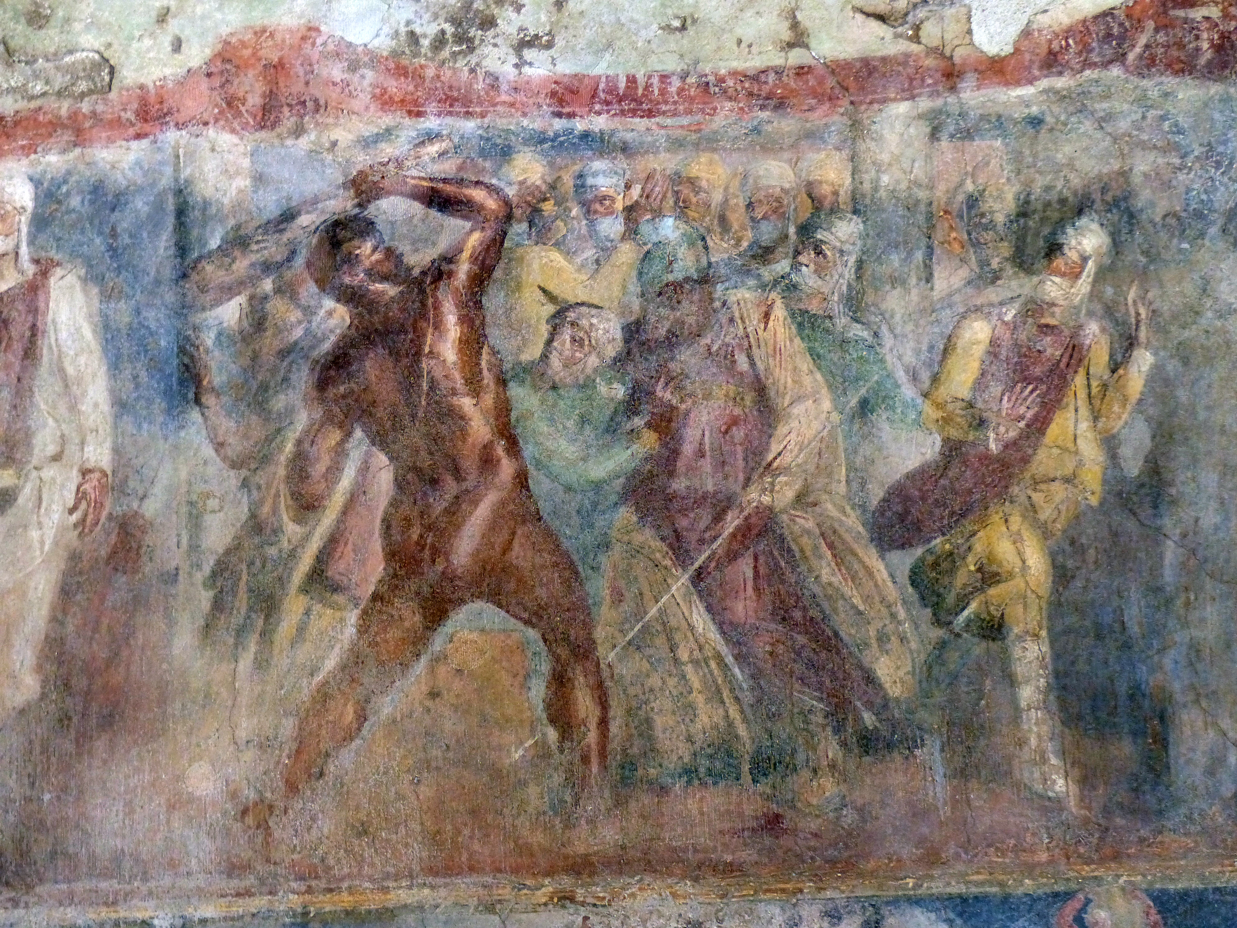 Casa de Ottavio Quartione